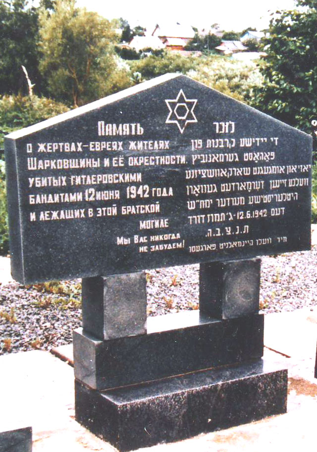 Памятник убитым евреям - узникам гетто в Шарковщине.